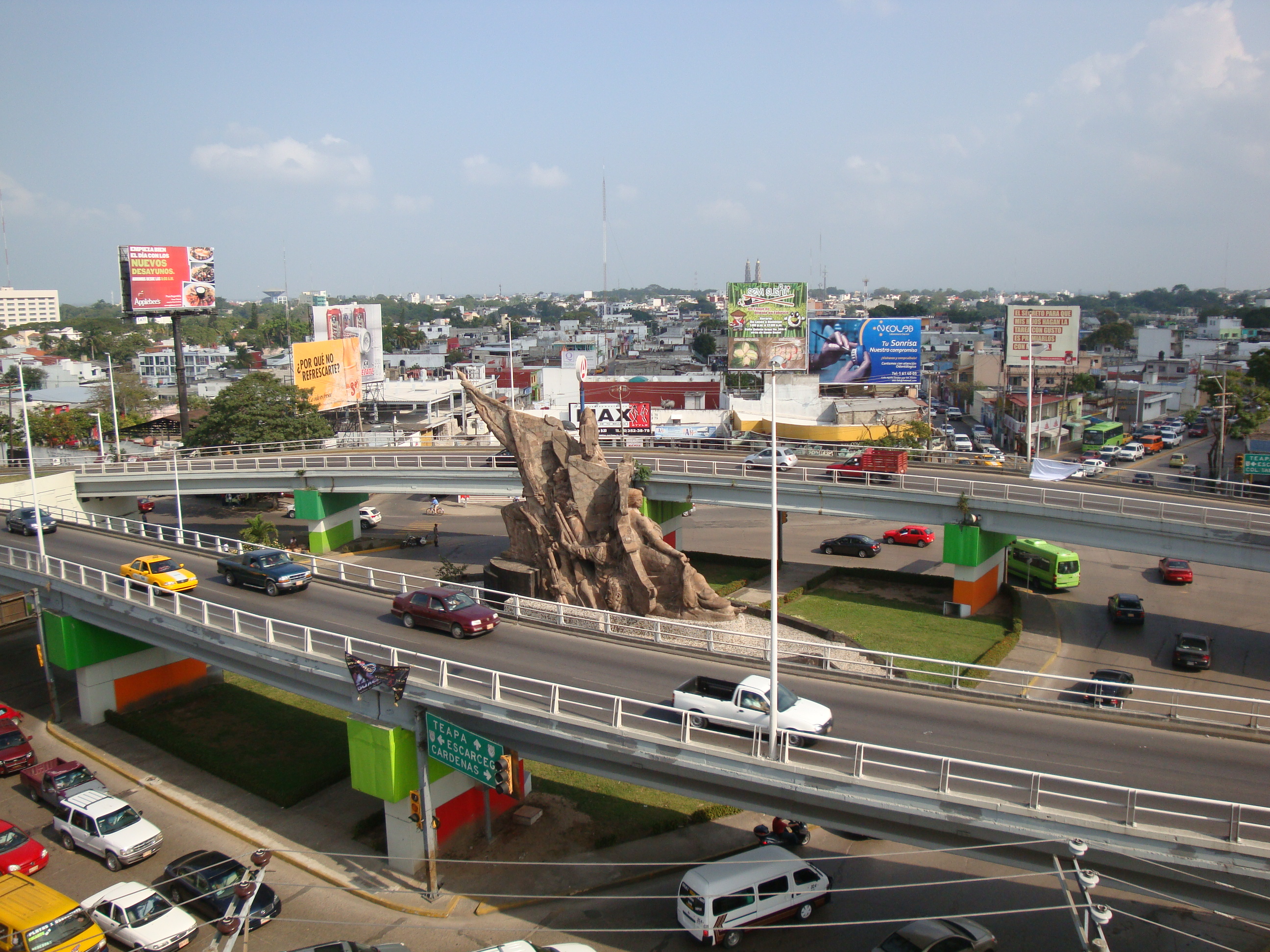 Panoramica del distribuidor vial de la glorieta Andrés Sánchez Magallanes, en la ciudad del Villahermosa, estado de Tabasco, México.